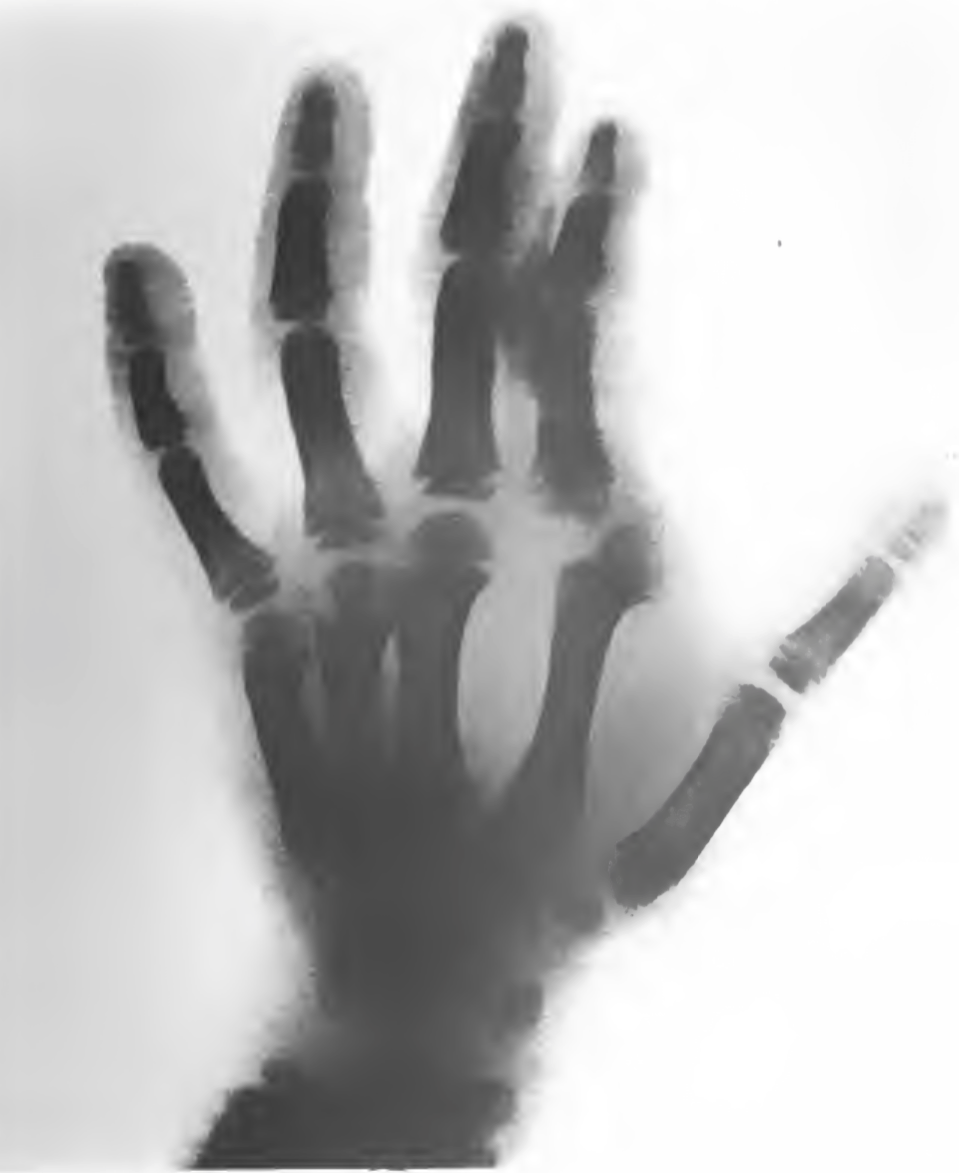 Rechte Hand eines Knaben mit Verletzung des zweiten Mittelhandknochens Aufgenommen am 29. Januar 1896 – Expositionszeit 4. Min